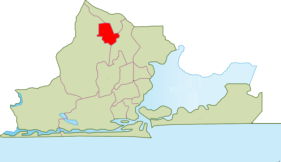 Mapa de Agege, Lagos